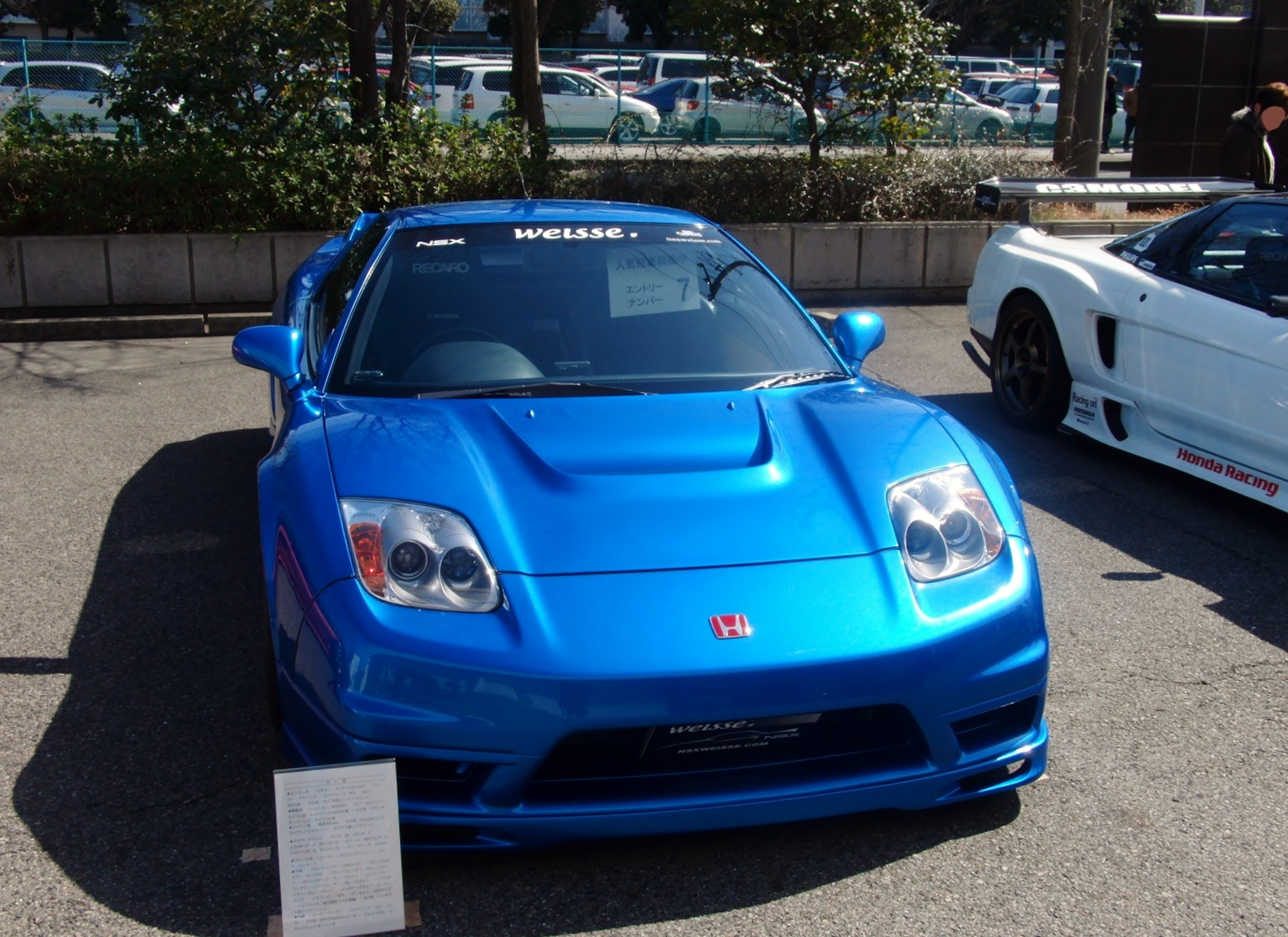 NAGOYAオートトレンド2011においてNA2型ホンダ・NSXｰRを撮影。